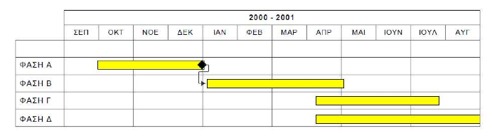 Παράδειγμα διαγράμματος Gantt (